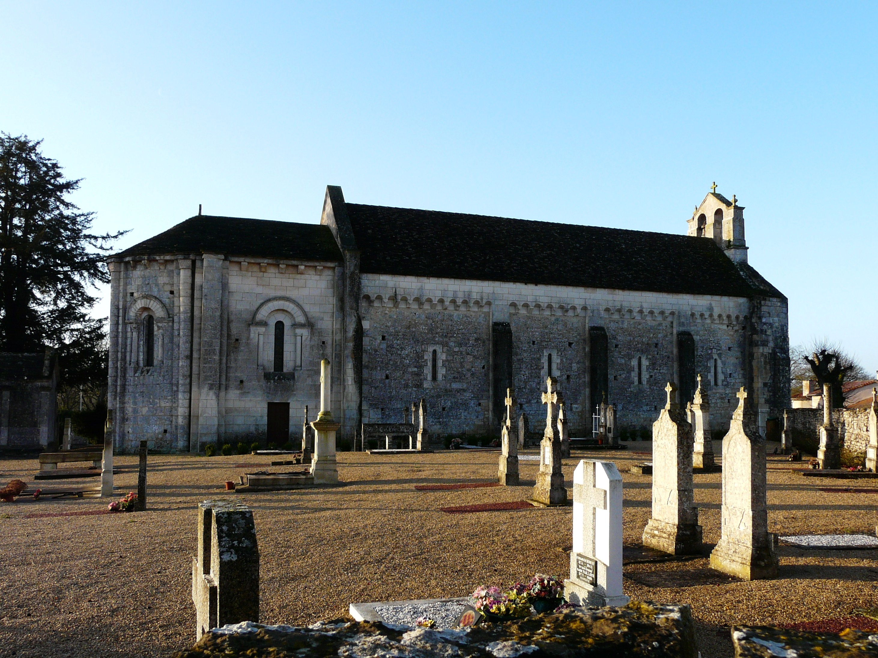 Le cimetière et la façade nord de l'église Saint-Pierre, Saint-Pierre-d'Exideuil, Vienne, France.